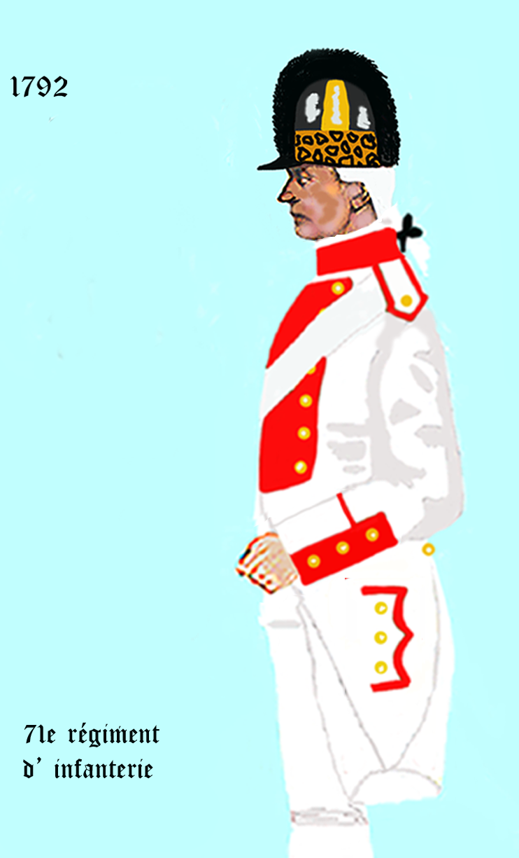 Uniform eines königlich französischen Infanterie-Regiments gemäß Dekret von 1792. - Entnommen und überarbeitet aus: „LES UNIFORMES ET LES DRAPEAUX DE L'ARMÉE DU ROI“ Marseille 1899.